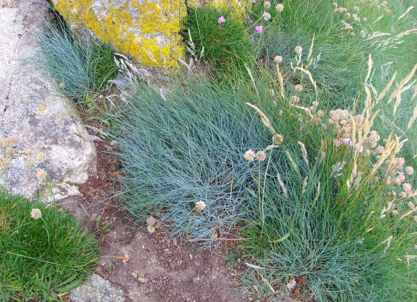 Touffes de Festuca rubra subsp. pruineuses, falaises du Cap Sizun, Finistère, France